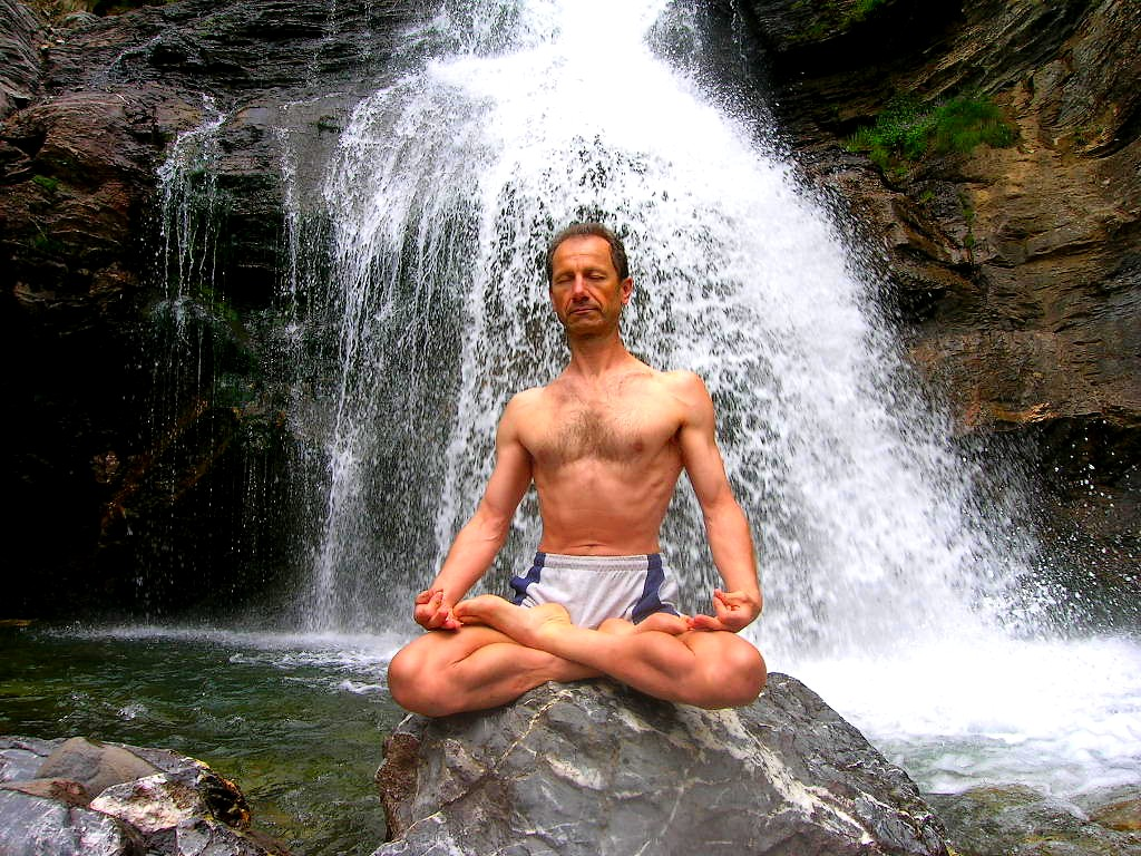 Tanumânasî Meditación en postura del Loto (Padmasana)